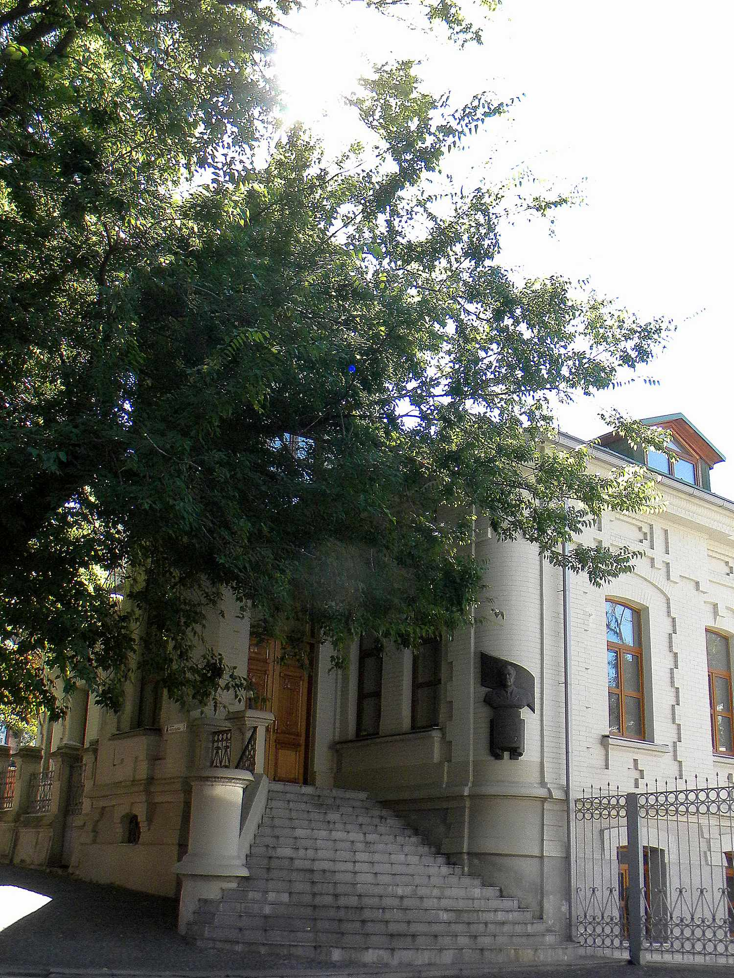 Особняк, Дніпро, узв. Крутогірний, 1